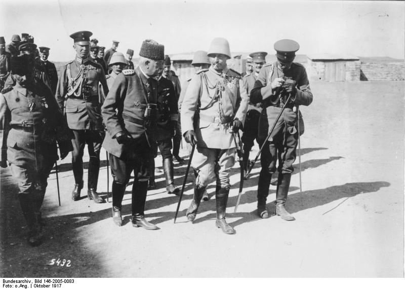 Der Kaiser auf Gallipoli. Der Kaiser beim Besuche eines der Dardanellen-Forts. Vor Hamidih; Oktober 1917 Filmtrupp Nr. 4 / Bild- und Filmamt (BUFA - Nr. 5432)